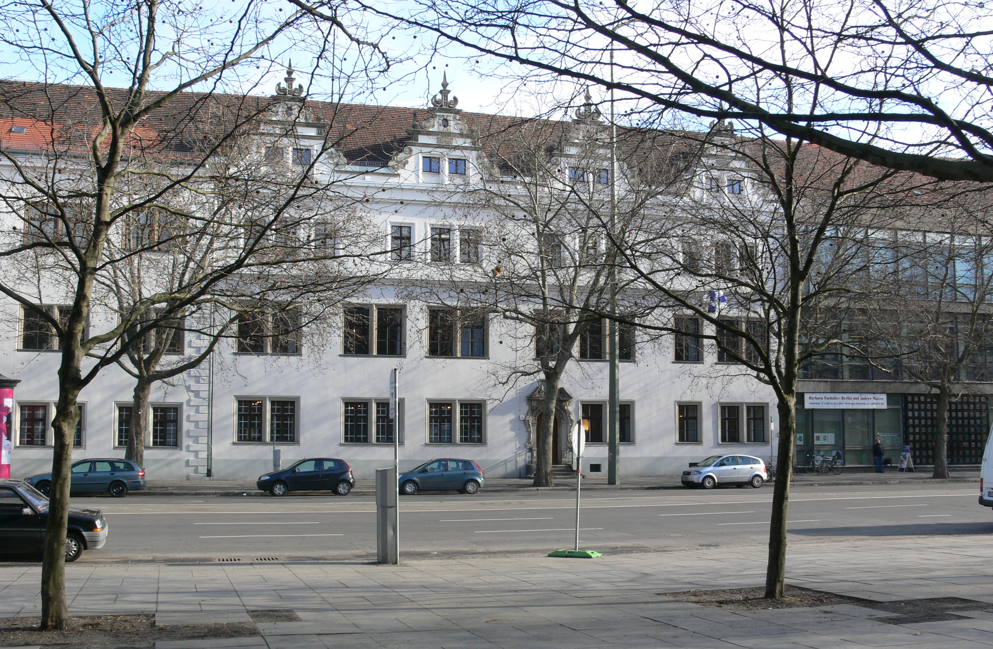 Ribbeck-Haus (erbaut 1624), Teil der Berliner Stadtbibliothek, Breite Straße (Spreeinsel), Berlin-Mitte